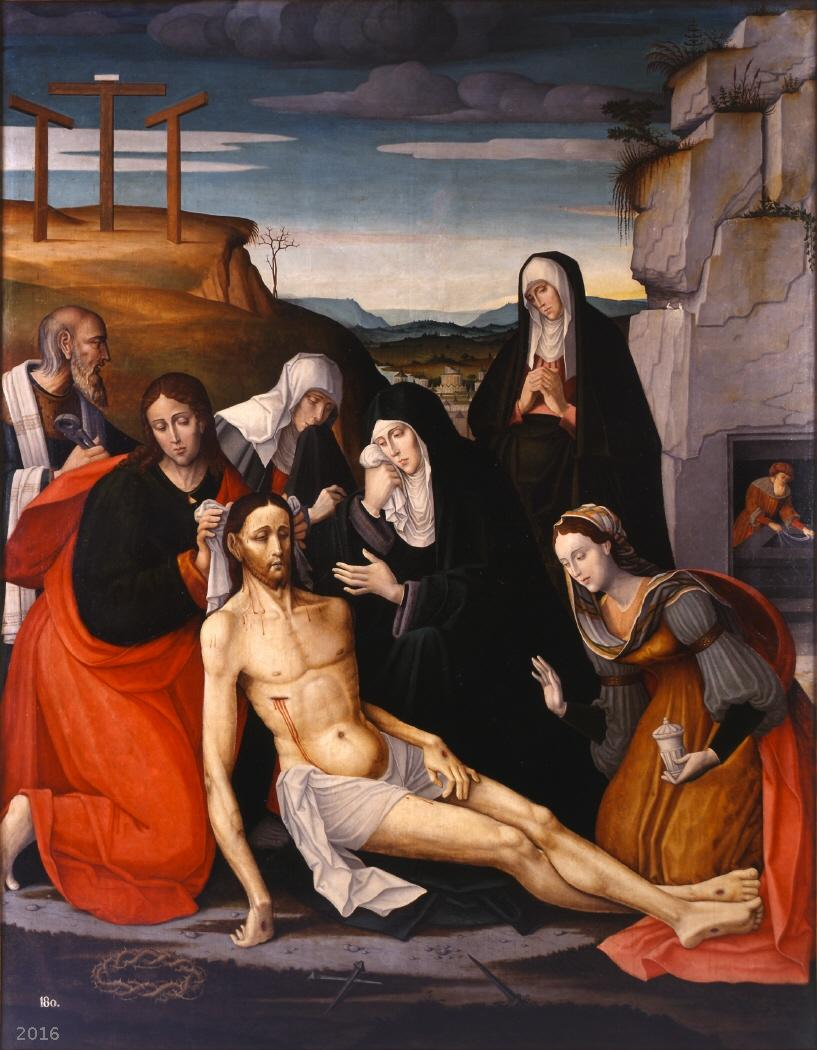 La obra representa el momento en que el cadáver de Jesucristo recibió sepultura en un sepulcro excavado en la roca, y al fondo de la tabla aparecen las tres cruces en el monte Calvario.